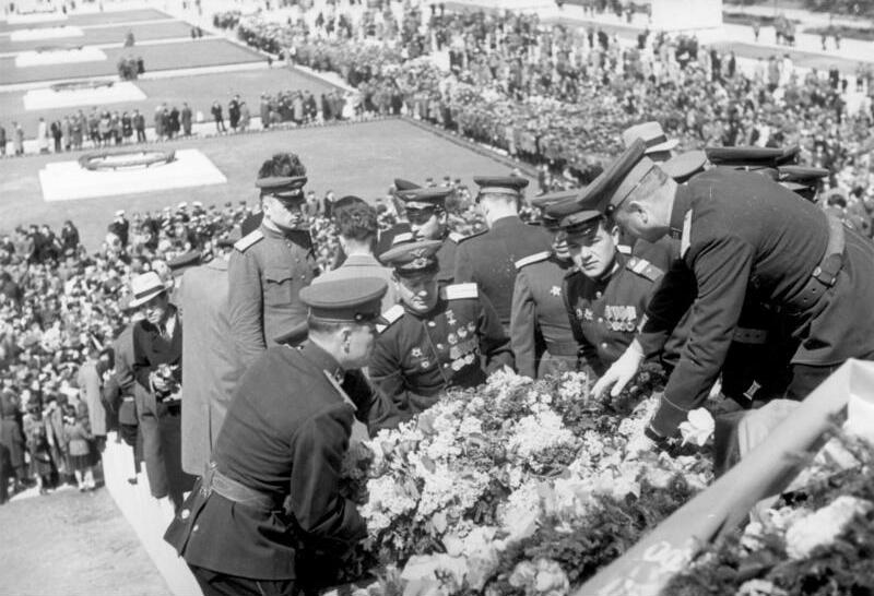 Berlin-Treptow, Einweihung sowjetisches Ehrenmal ADN-ZB-SNB-Malischew 9.5.1949 Einweihung des sowjetischen Ehrenmals in Berlin-Treptow am 8,5,1949 5050-50